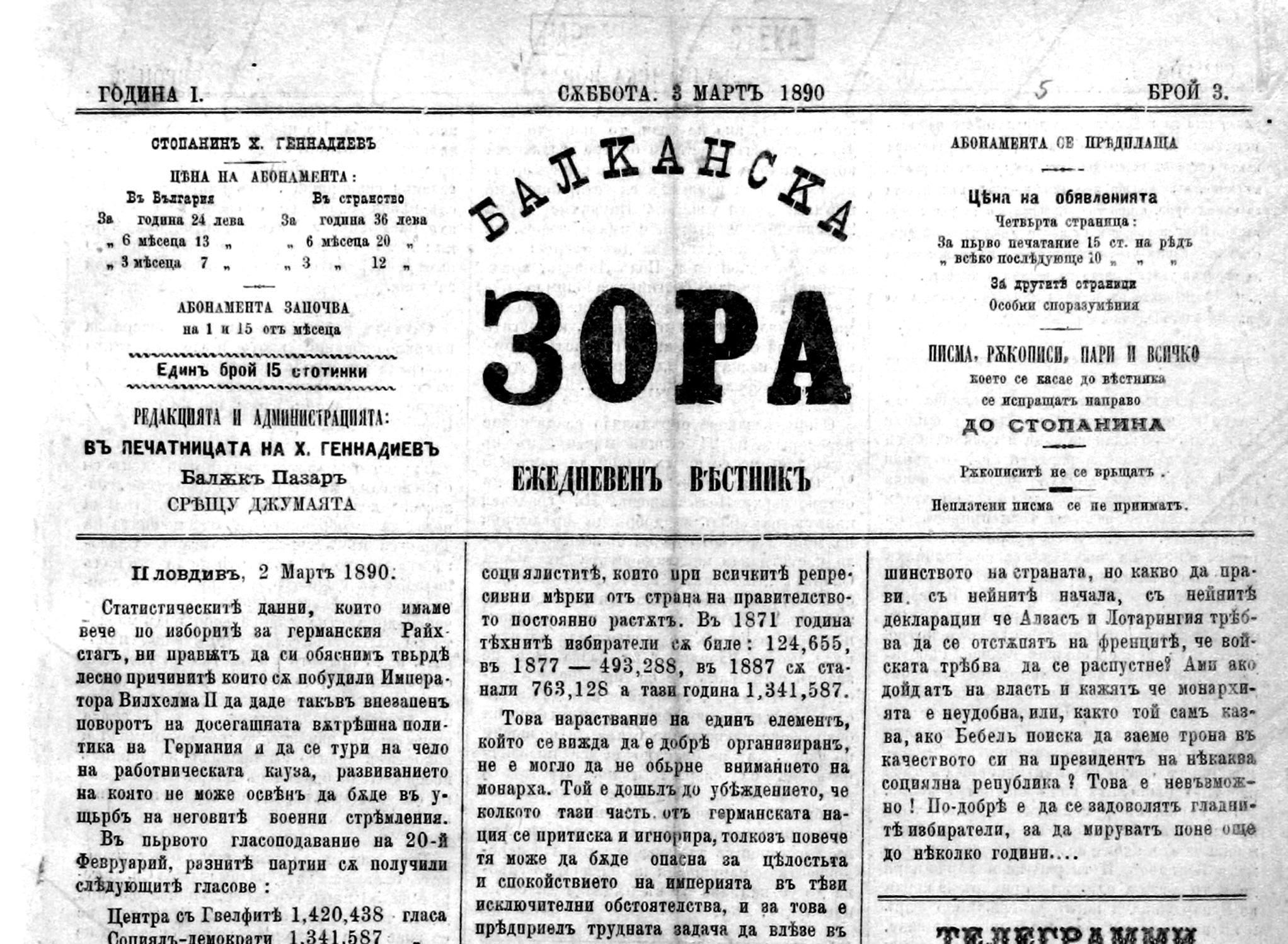 Главата на вестник Балканска зора, брой 3, 3 март 1890 година.